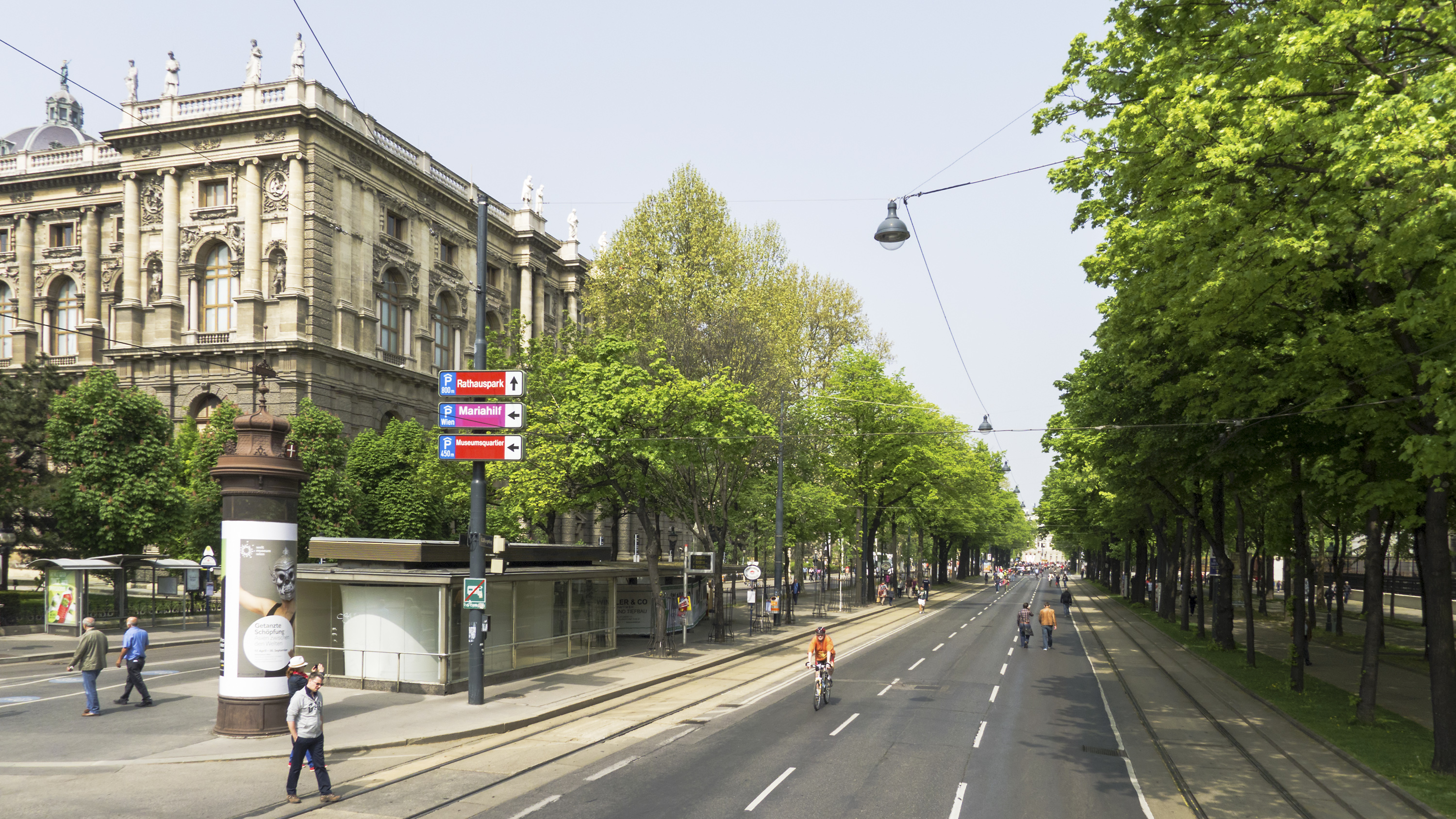 Burgring in Wien 1 bei der Babenbergerstraße Richtung Nordwesten